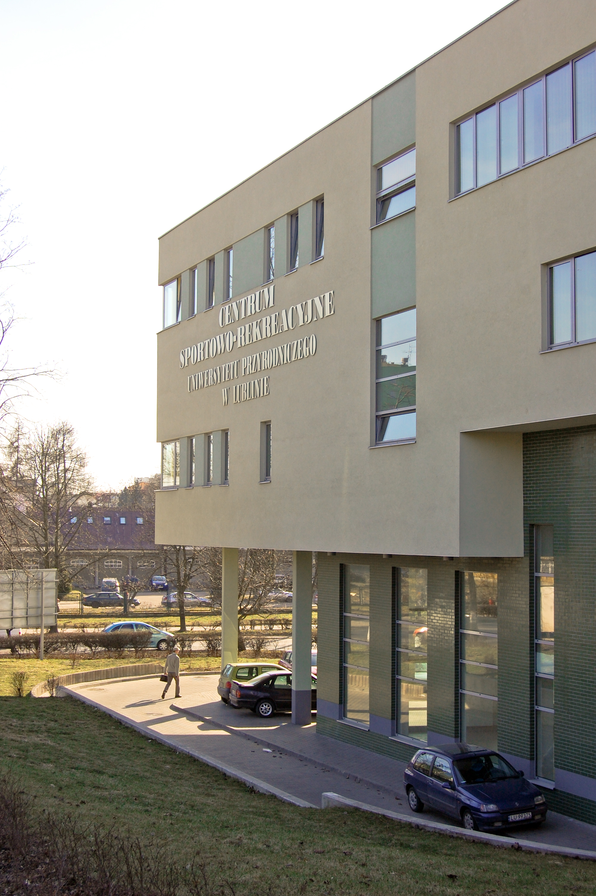 Centrum Sportowo-Rekreacyjne Uniwersytetu Przyrodniczego w Lublinie